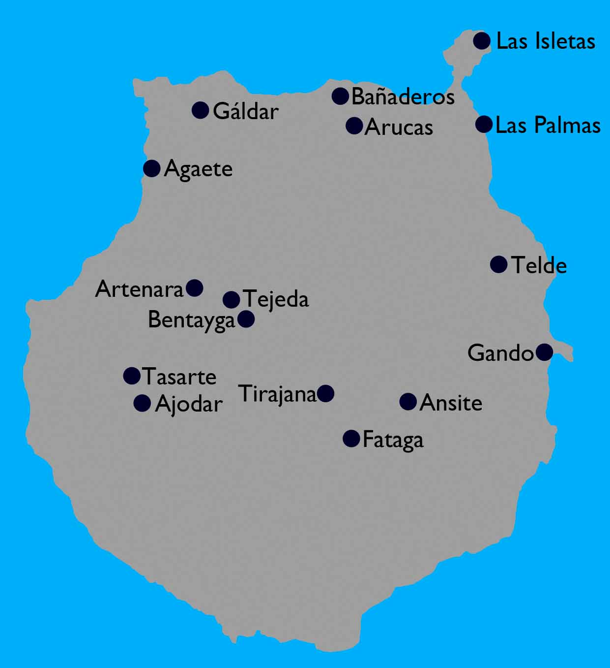 Sitios importantes durante la conquista de Gran Canaria 1478 - 1483